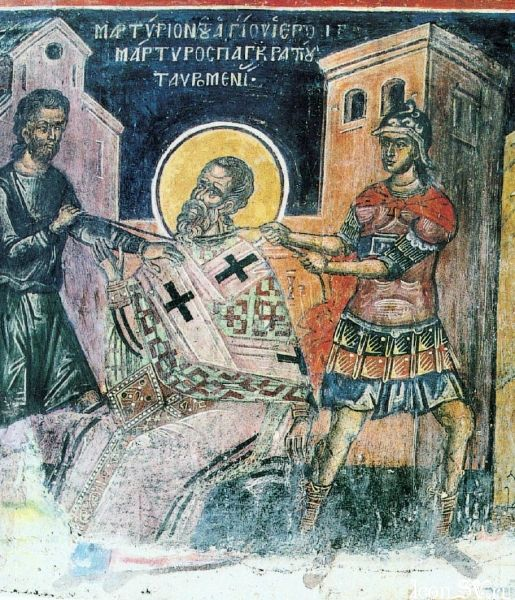 Мучения Панкратия Тавроменийскогого Афон, Дионисиат. 1547 г. Тзортзи (Зорзис) Фука.